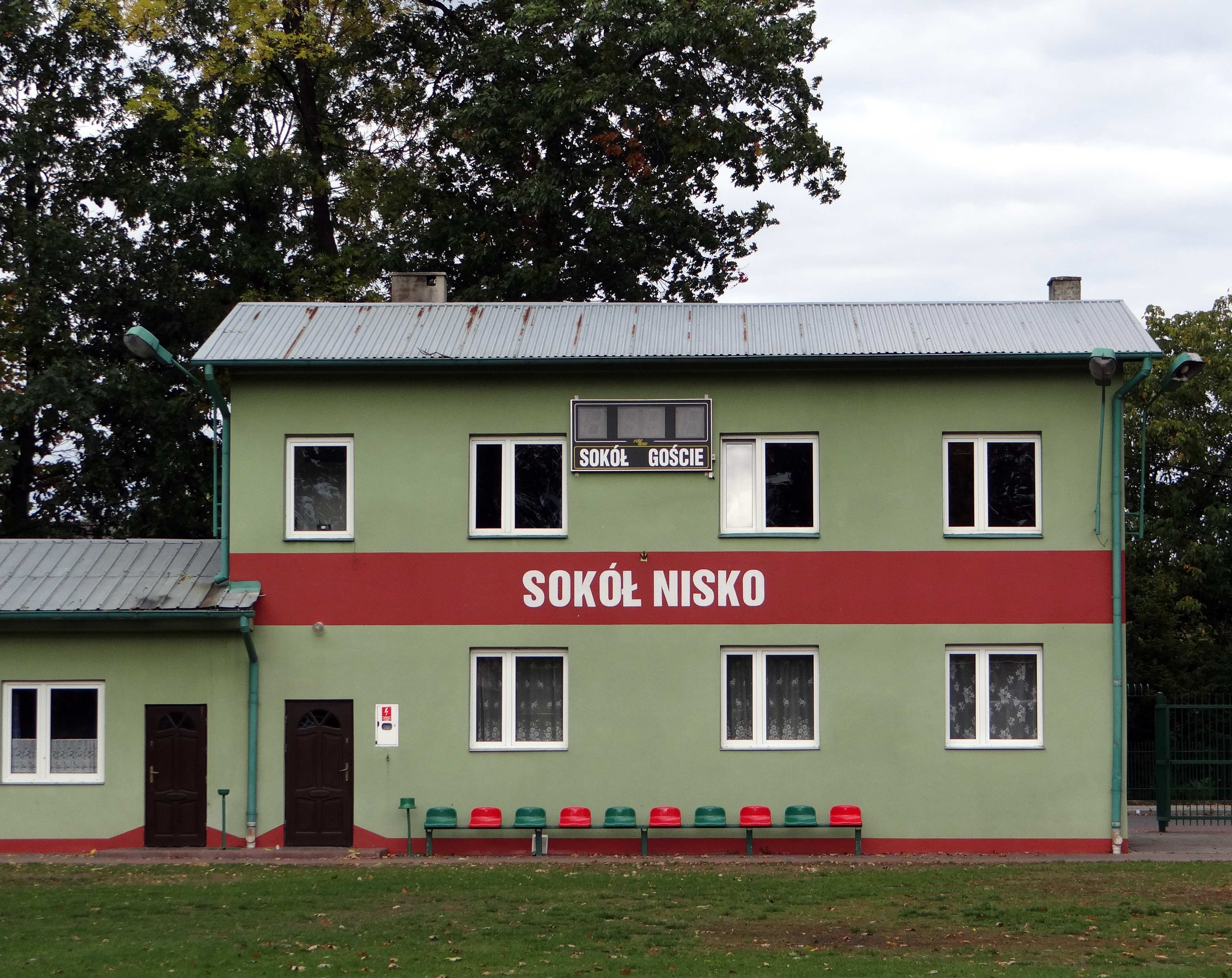 Teren Miejskiego Klubu Sportowego "Sokół Nisko"